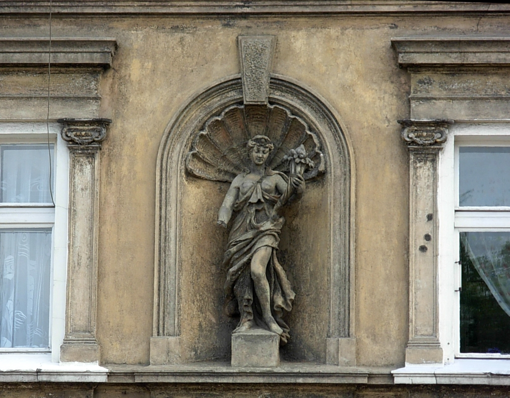 Ulica Nakielska w Bydgoszczy - detal kamienicy